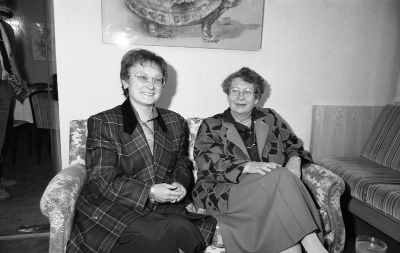 Bonn, 8. März 1989 Die parlamentarische Staatssekretärin beim Bundesminister für Bildung und Wissenschaft, Irmgard Karwatzki (l.), empfing die Staatssekretärin im Ministeriun für Bildung und Wissenschaften des Königreichs der Niederlande, Nell J. Ginjaar-Maas, zu einem Meinungsaustausch.